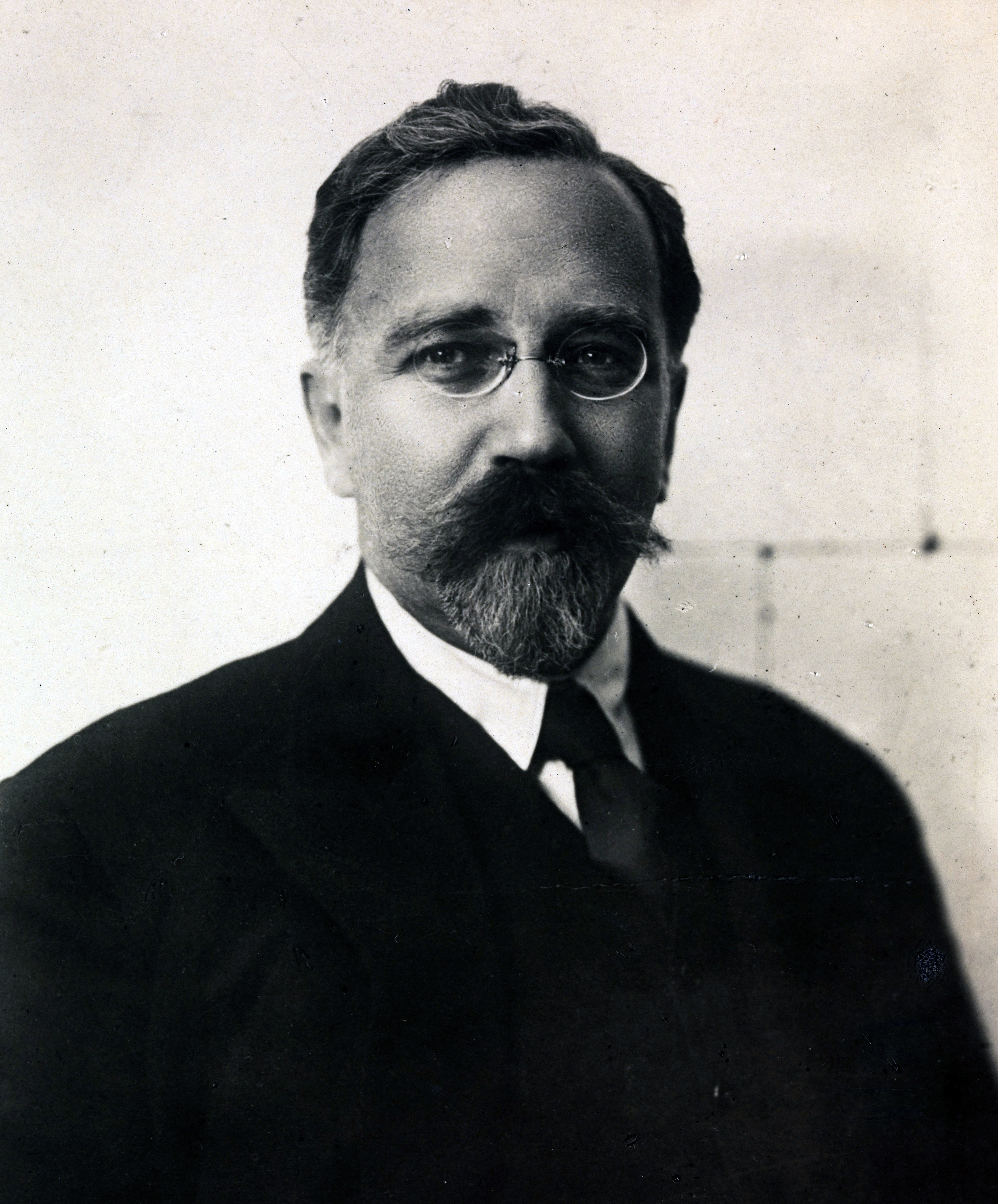 L. B. Kamjenjev, viseformann i rådet for Sovnarkom, viseformann i STO (rådet for arbeid og forsvar), formann i Moskvarådet (Mossovjet). Depicted person: Kamjenjev, L. B. Depicted place: Russia